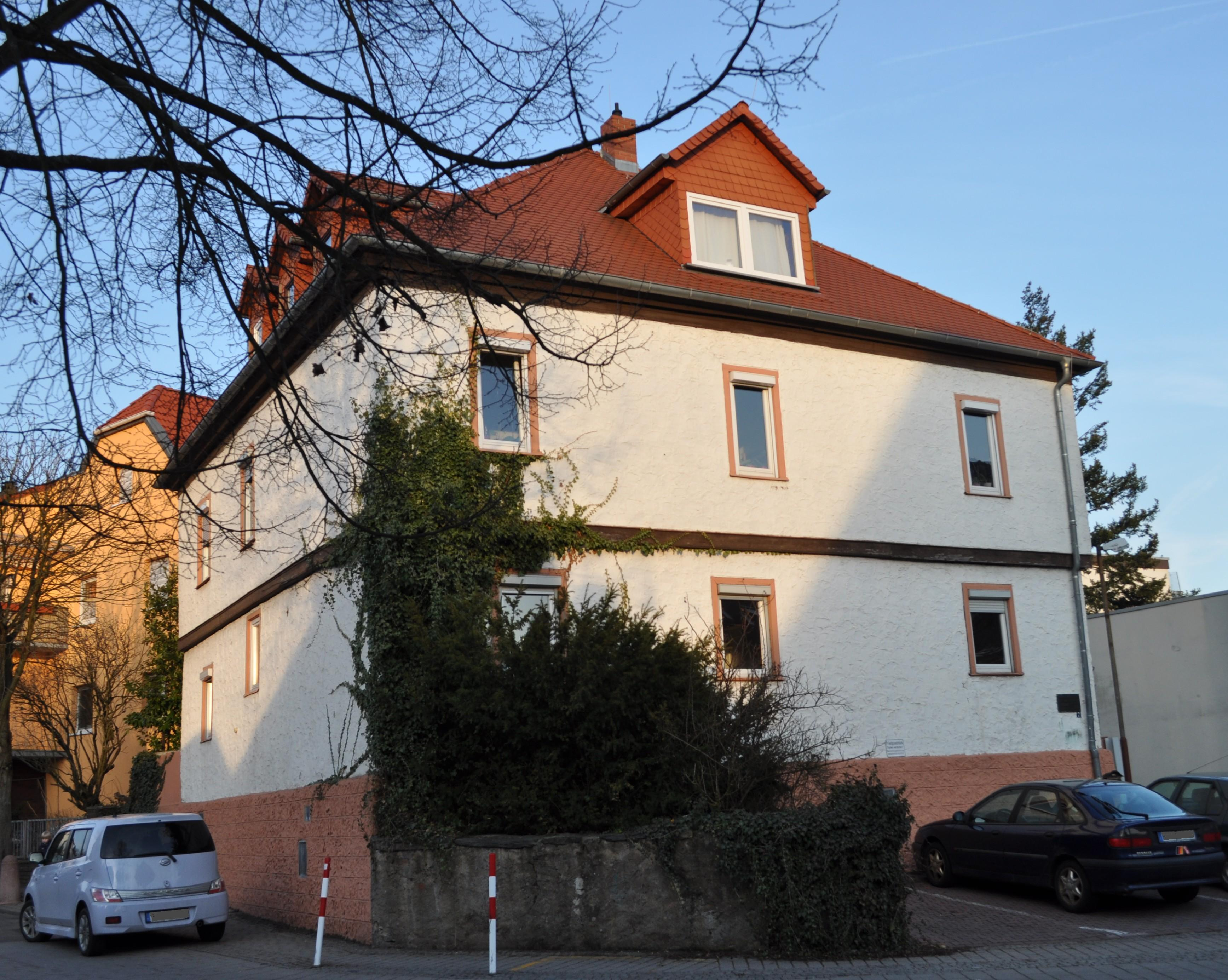 Das Schultheißenamt in Steinbach (Taunus). Das Haus wurde 1549 erstmals urkundlich erwähnt. Ab 1869 wurde das Haus als Gaststätte "Zum Taunus" genutzt.